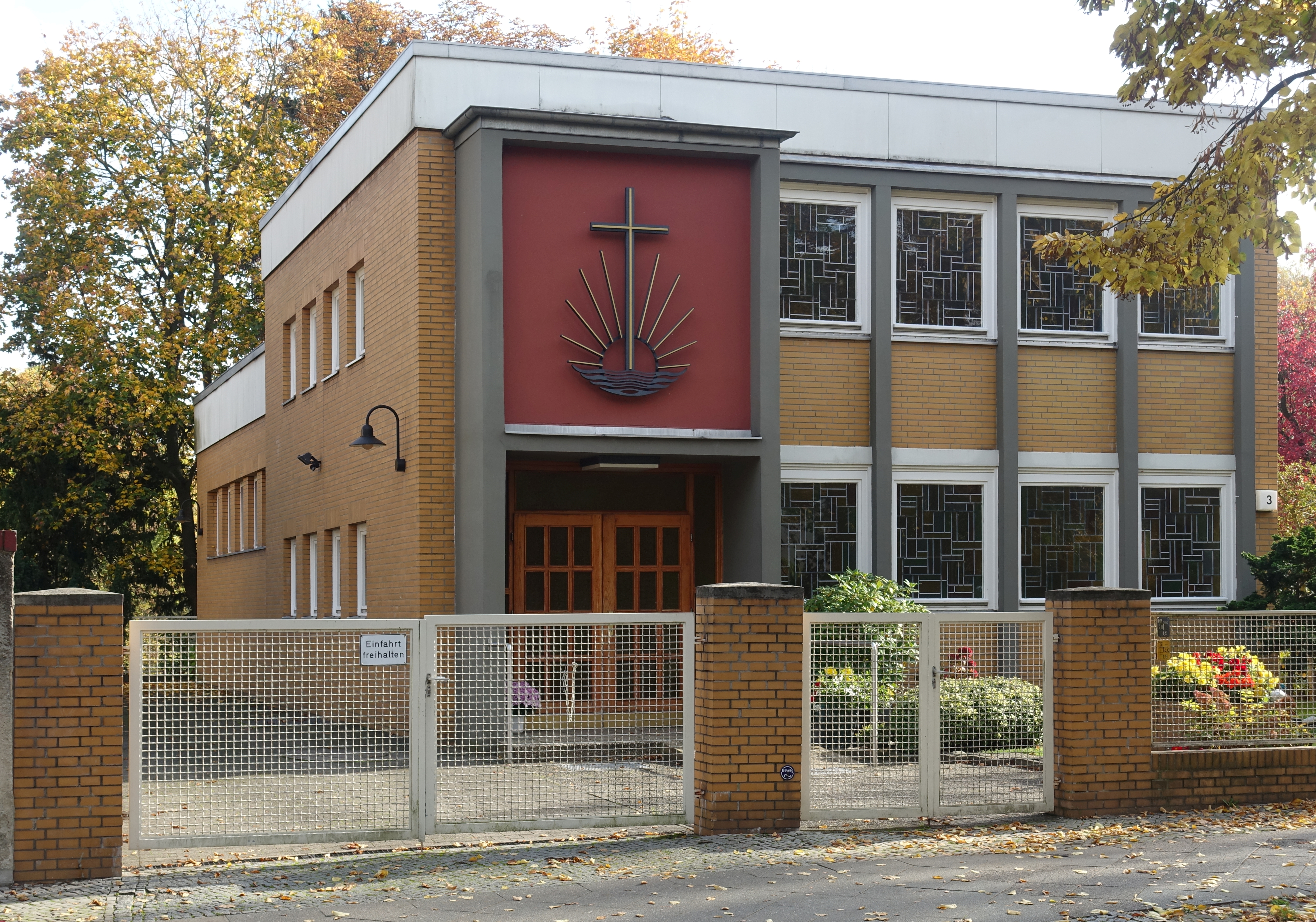 Grunstückseingang zur Neuapostolischen Kirche